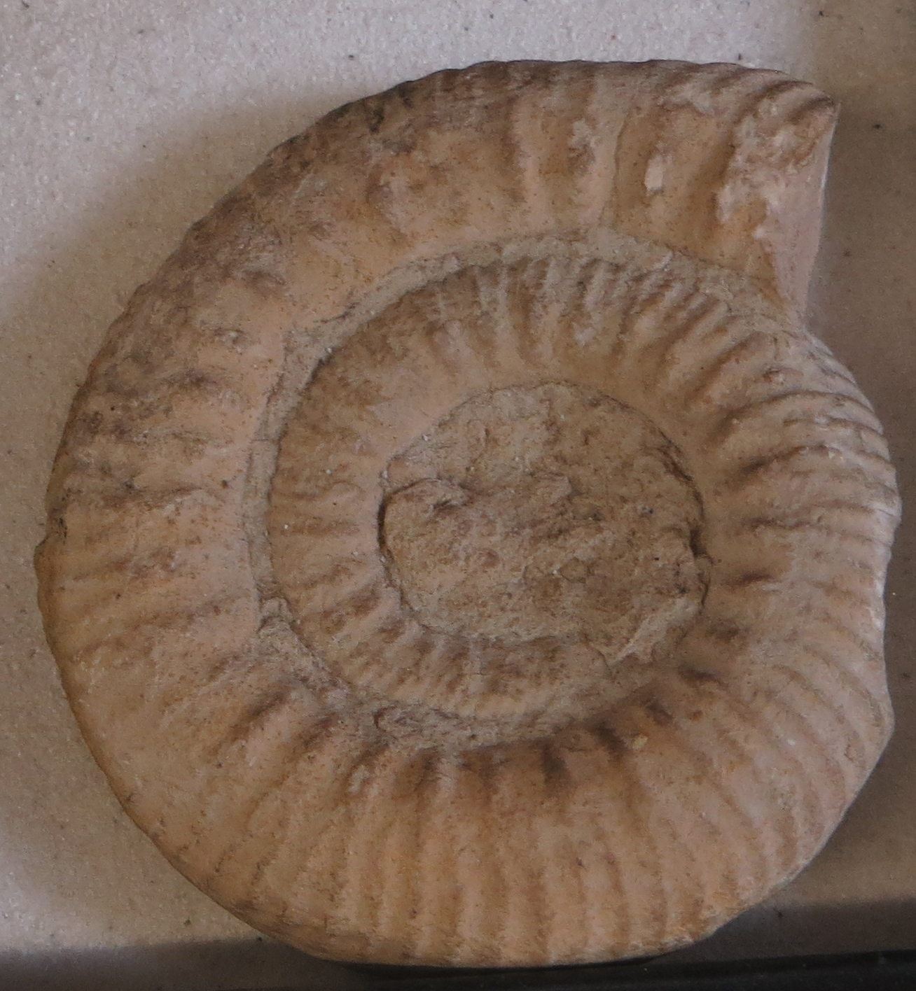 Fossil of Hammatoceras - Took the picture at Natural History Museum, Bonn University